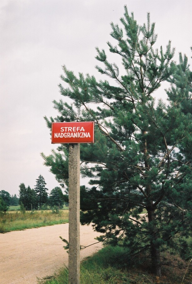 znak oznaczający początek strefy nadgranicznej na drodze między wsiami Krzywiec a Podborowiska